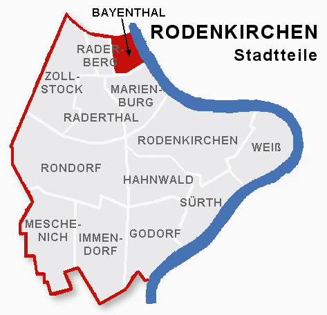 Lage des Stadtteils Bayenthal im Stadtbezik Rodenkirchen